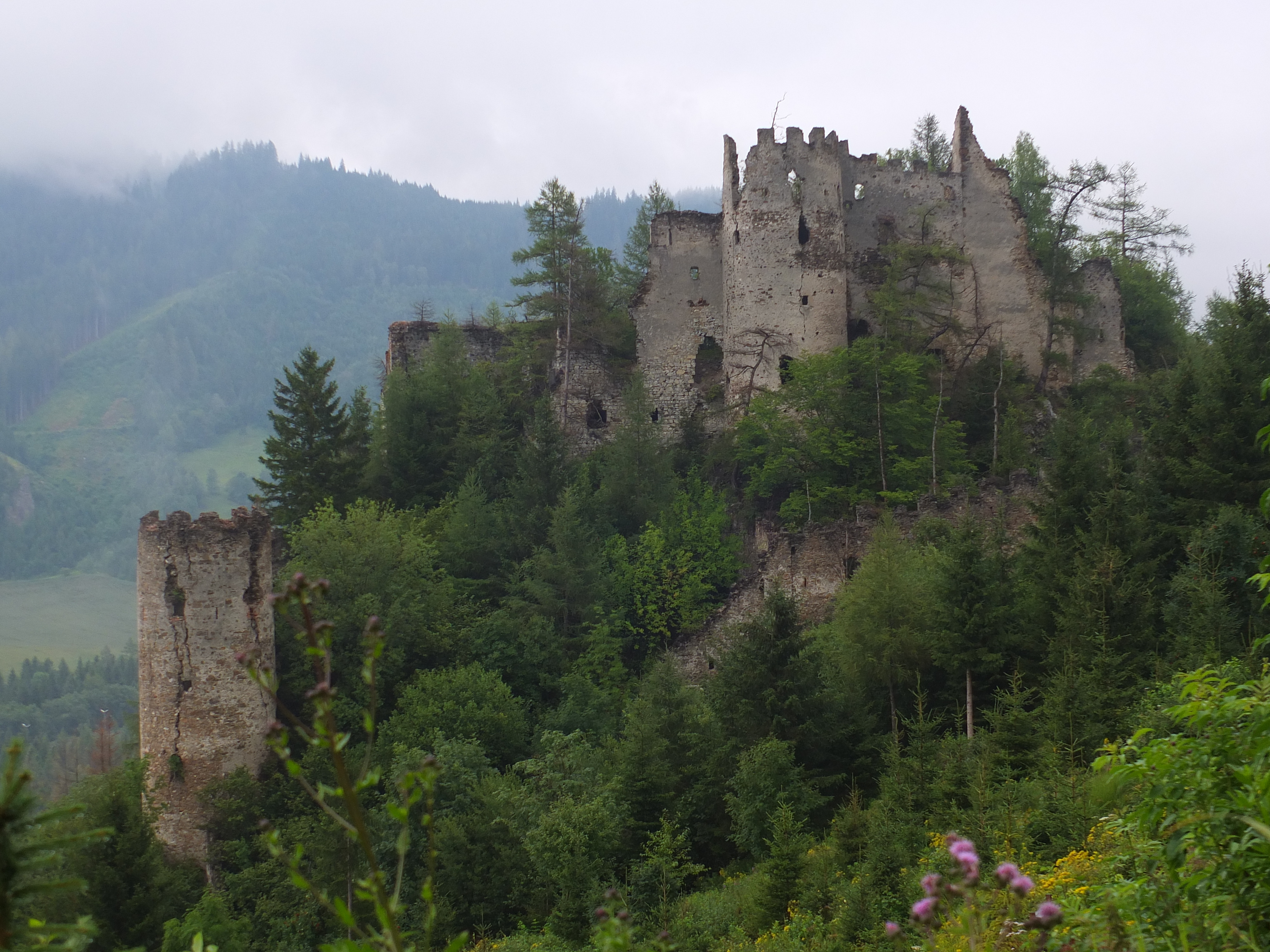 Gesamtansicht der Burg Reifenstein von Westen gesehen.